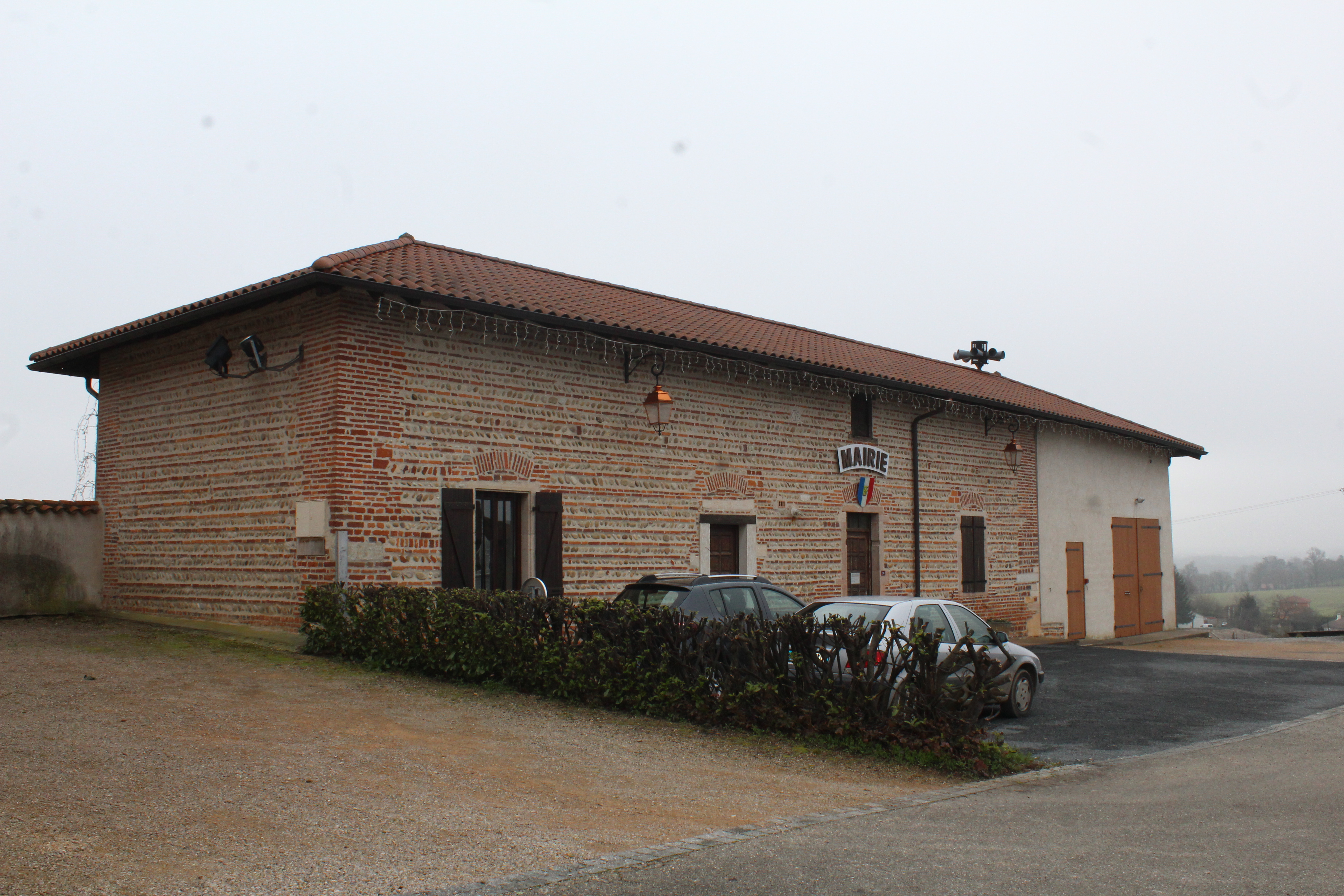 Mairie de Chanoz-Châtenay.